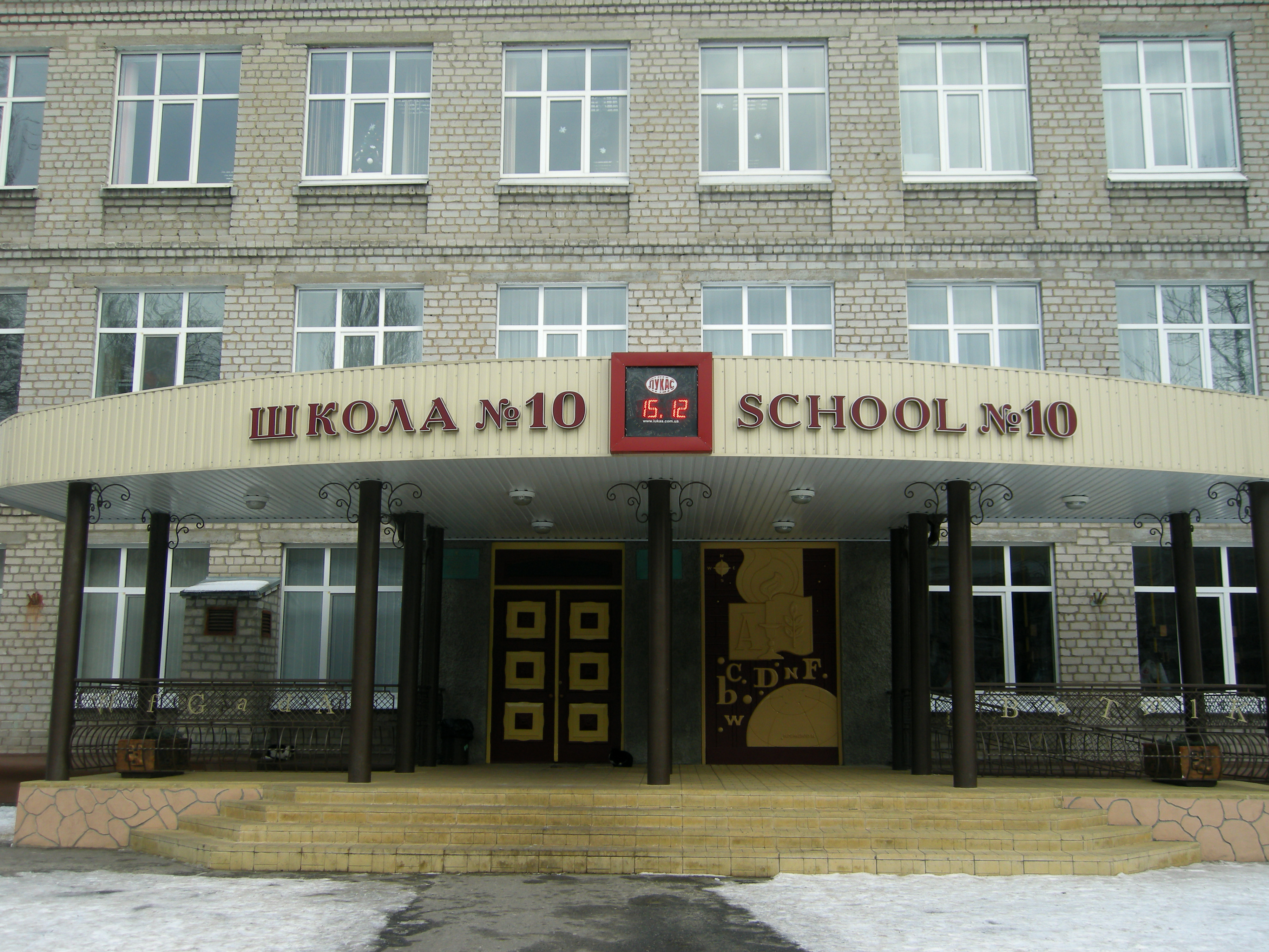 Кременчугская СОШ № 10